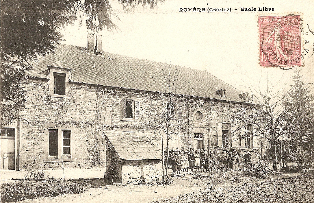 Carte Postale, école privée à Royère (Creuse) en 1906 : "Royère (Creuse) - Ecole Libre"